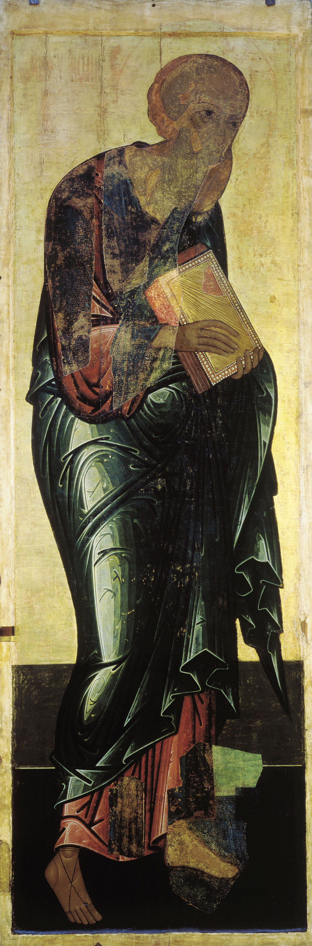 Иоанн Богослов Школа или худ. центр: Москва 1408 г. 312 × 105 см Государственная Третьяковская галерея, Москва, Россия Инв. 19730 Из деисусного чина Успенского собора во Владимире